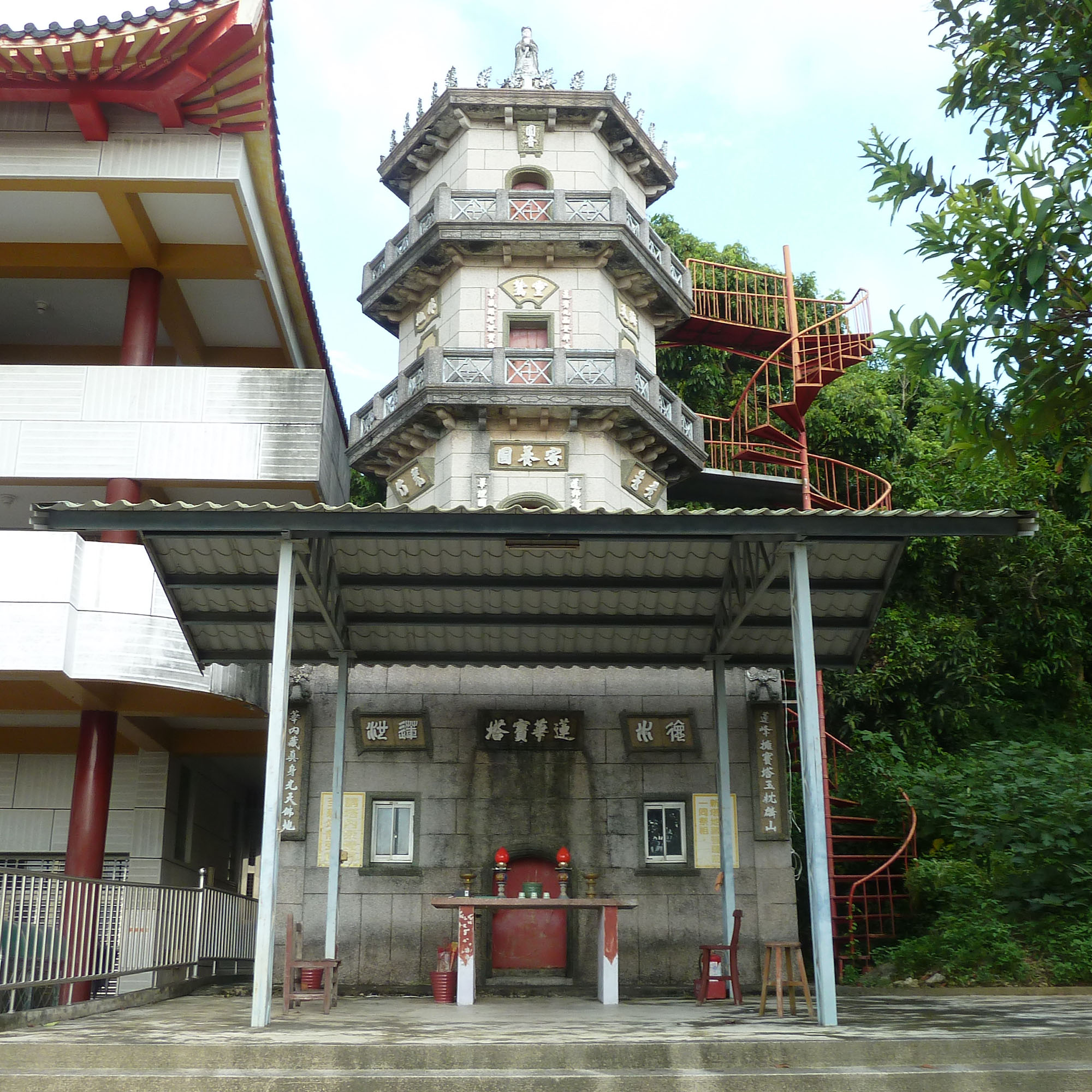 中文（台灣）: 高雄市阿蓮區大崗山蓮峰寺蓮華寶塔外觀